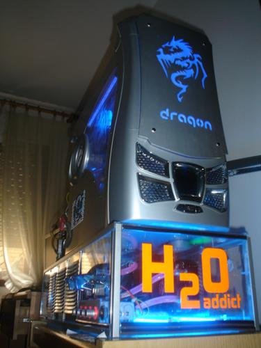 torre dragon amb refigeració liquida.